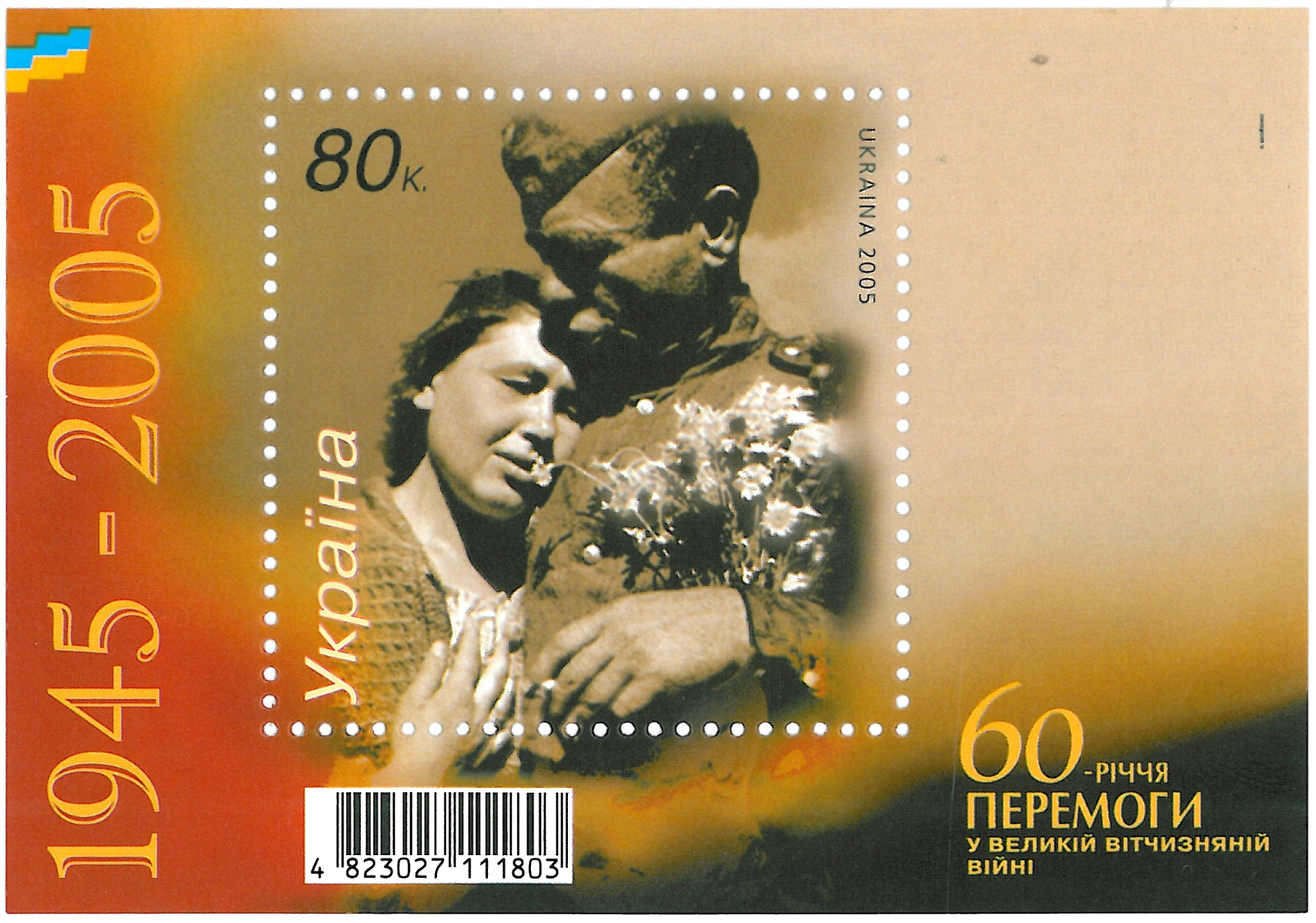 Блок Украины 60 лет Победы. Укрпошта, 2005. Номинал 80 копеек.